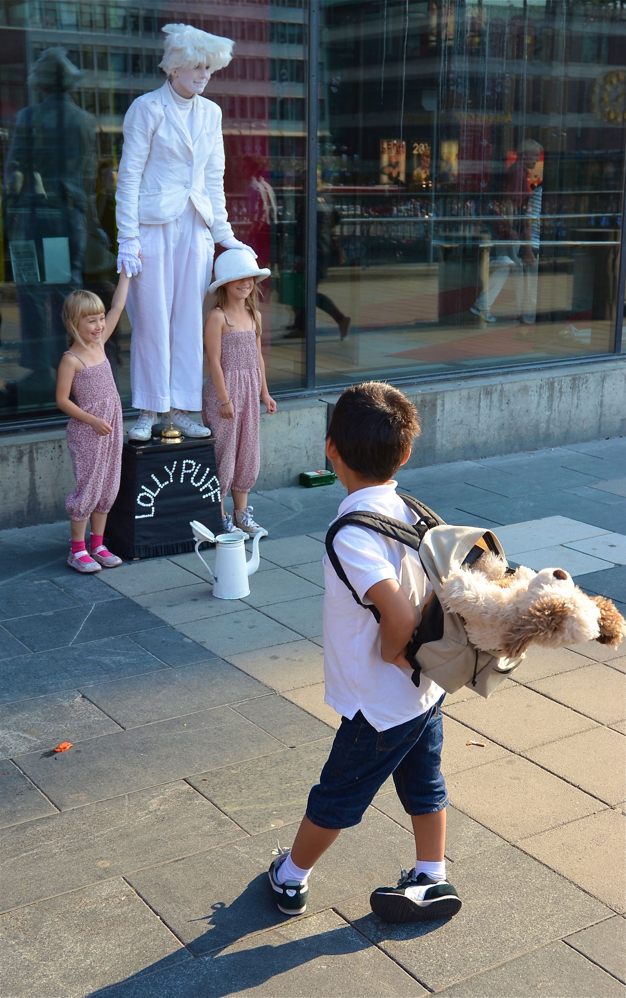 Gatuartist på Sergels torg i Stockholm den 27 augusti 2011.